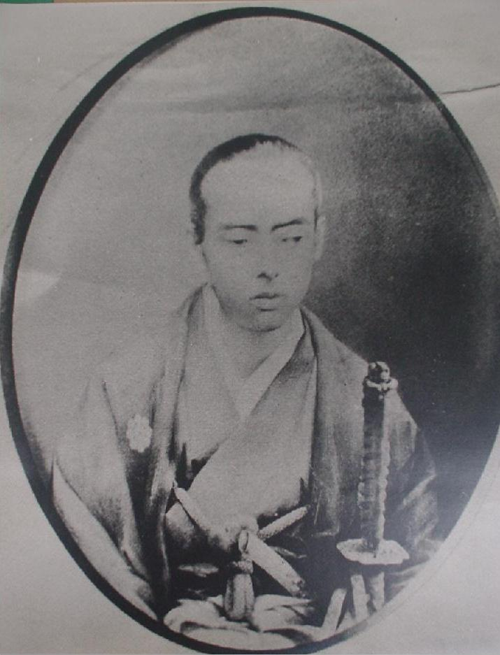 Portrait of Kikkawa Tsunemasa (吉川経幹, 1829 – 1867)